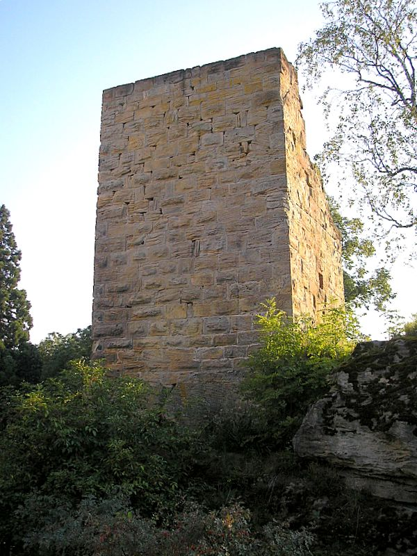 Burg Lichtenstein, Ruine der Nordburg (Gemeinde Pfarrweisach, Landkreis Haßberge, Unterfranken). Der Bergfried. Eigene Aufnahme, Aug. 2007 / Lichtenstein castle (Ruin of the northern castle) near Pfarrweisach (Lower Franconia, Germany). The keep. Own photo, Aug. 2007